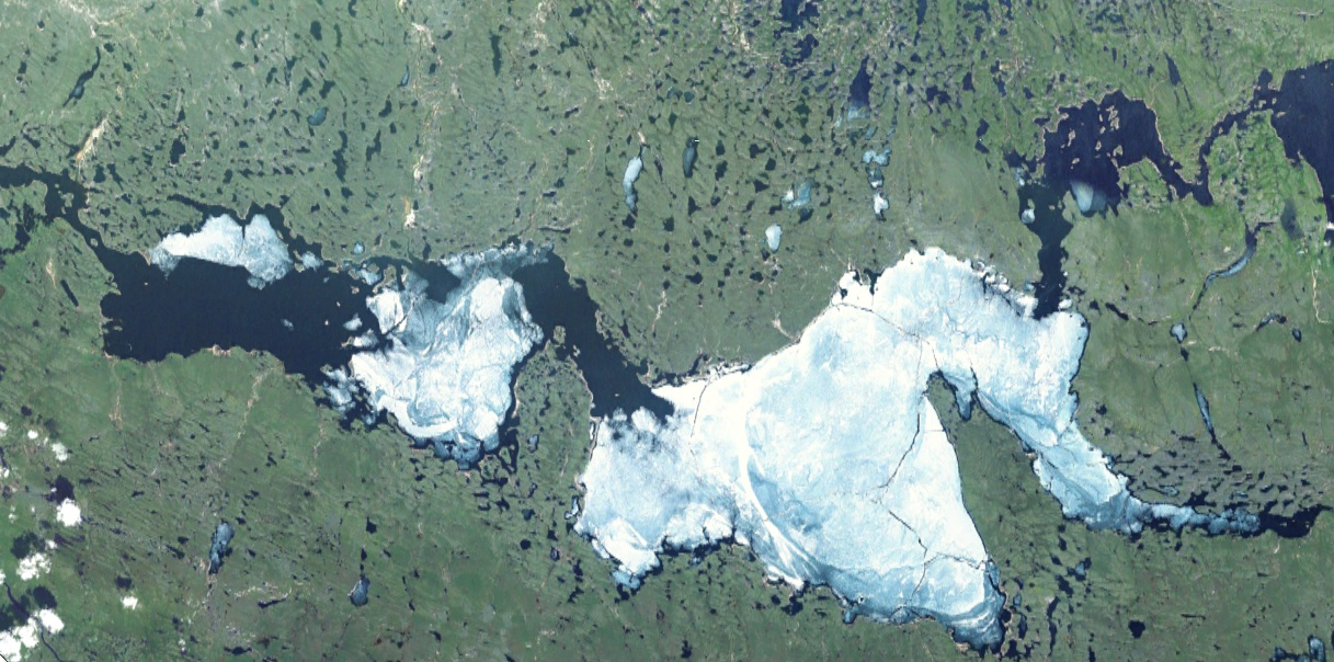 Lac Aberdeen, Nunavut (sans VirtualEarth)